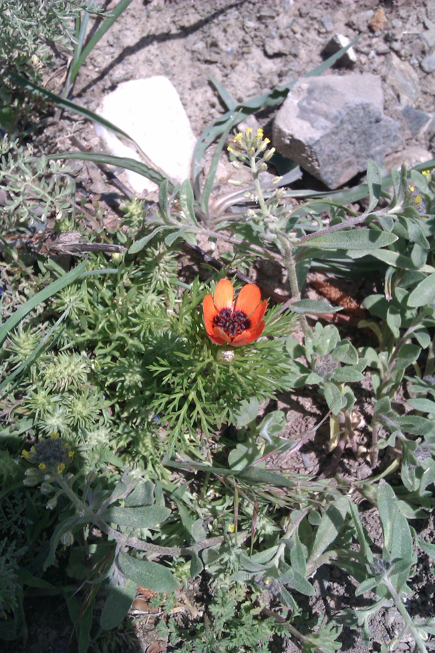 گونه های گیاهی روستای ییلاقی فرج آباد